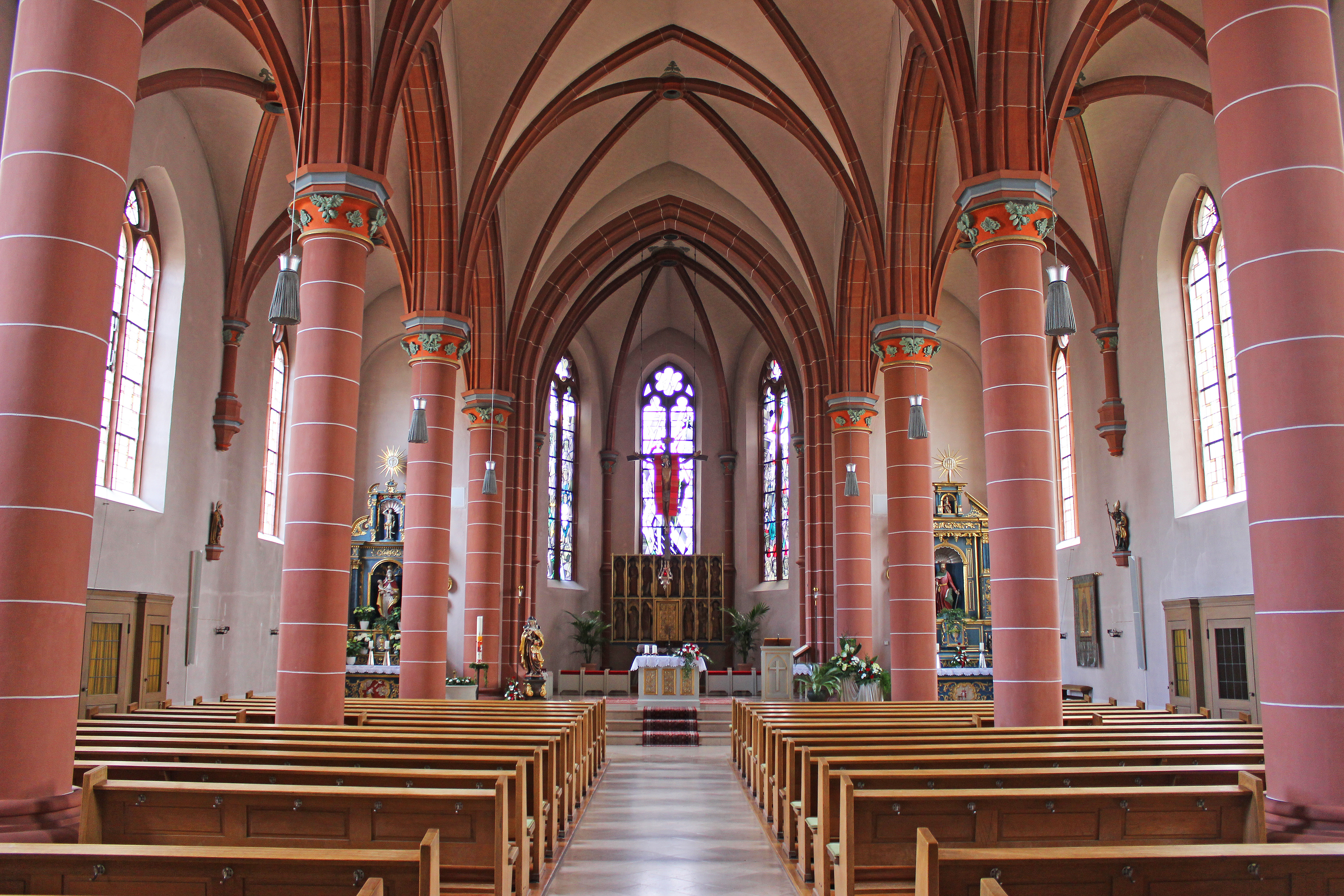 Blick ins Innere der katholischen Pfarrkirche St. Maximin in Pachten, einem Stadtteil von Dillingen, Landkreis Saarlouis, Saarland.